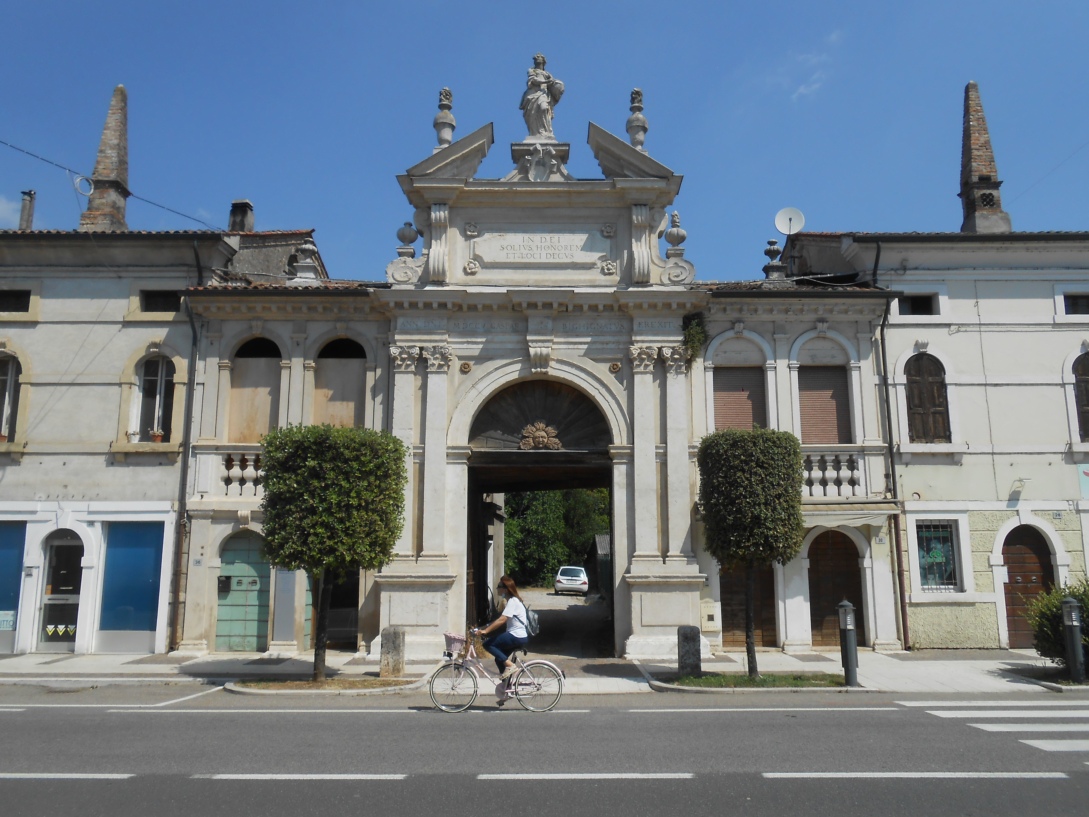 Palazzo Bighignatus a Minerbe